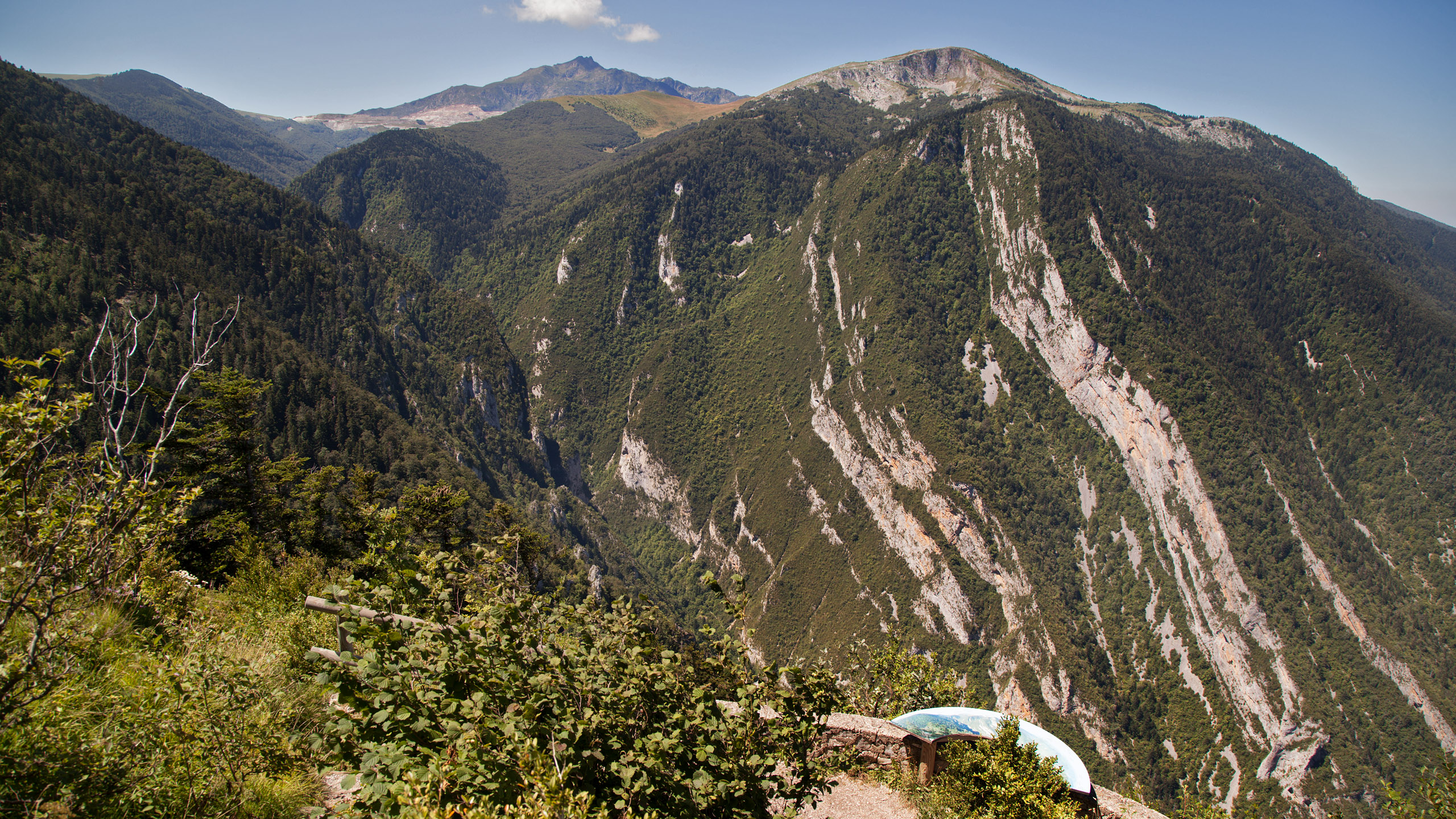 Vue depuis le belvédère